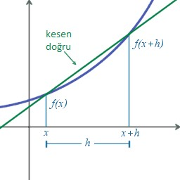 sayısal türev kesen doğru grafiği